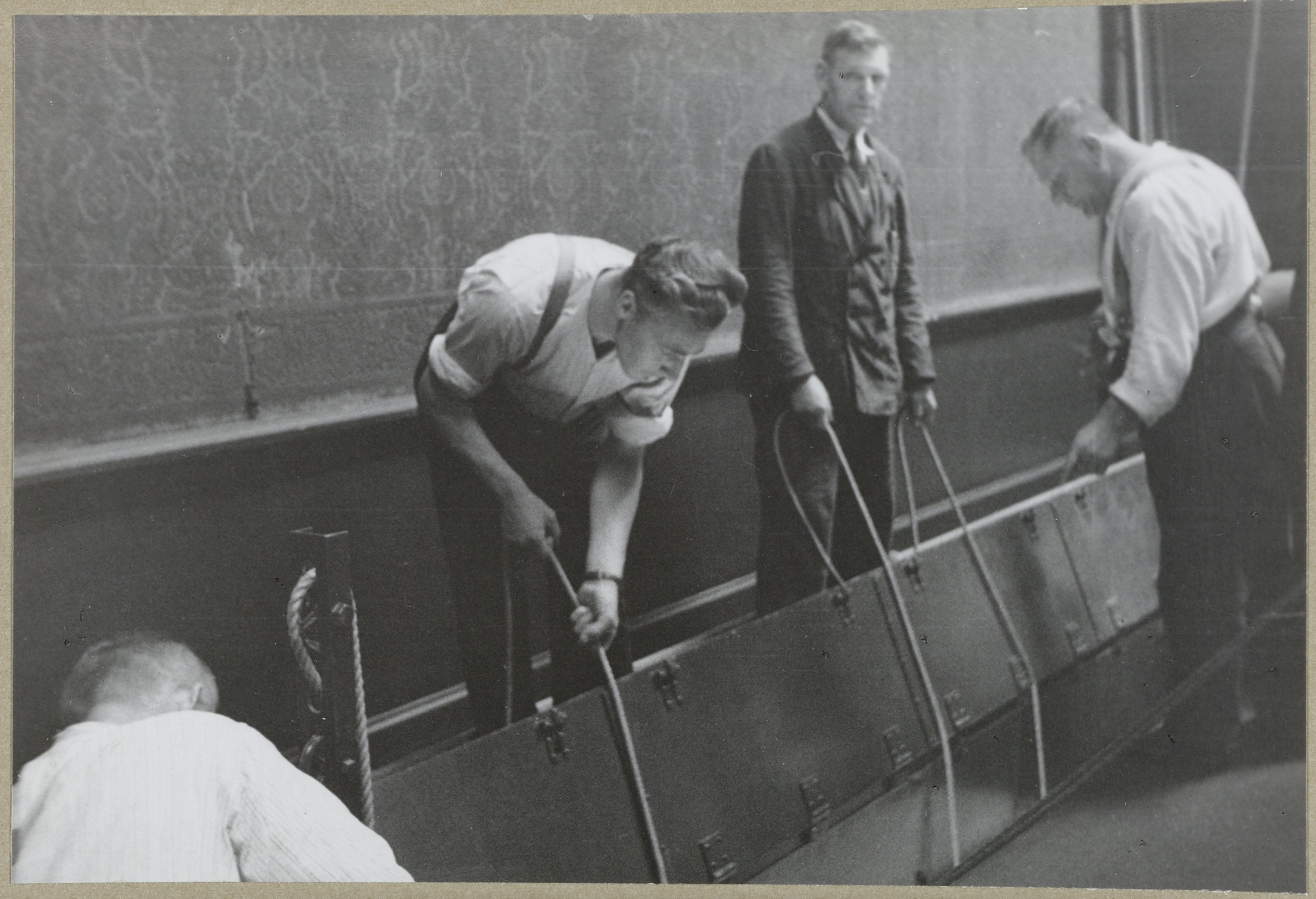 Mannen laten een schilderijenkist zakken door de Nachtwachtgleuf in de vloer van de Erezaal, welke direct naar de onderdoorgang leidt. In 1939 vond evacuatie van veel zaken plaats in verband met oorlogsdreiging. Het museum werd gesloten.